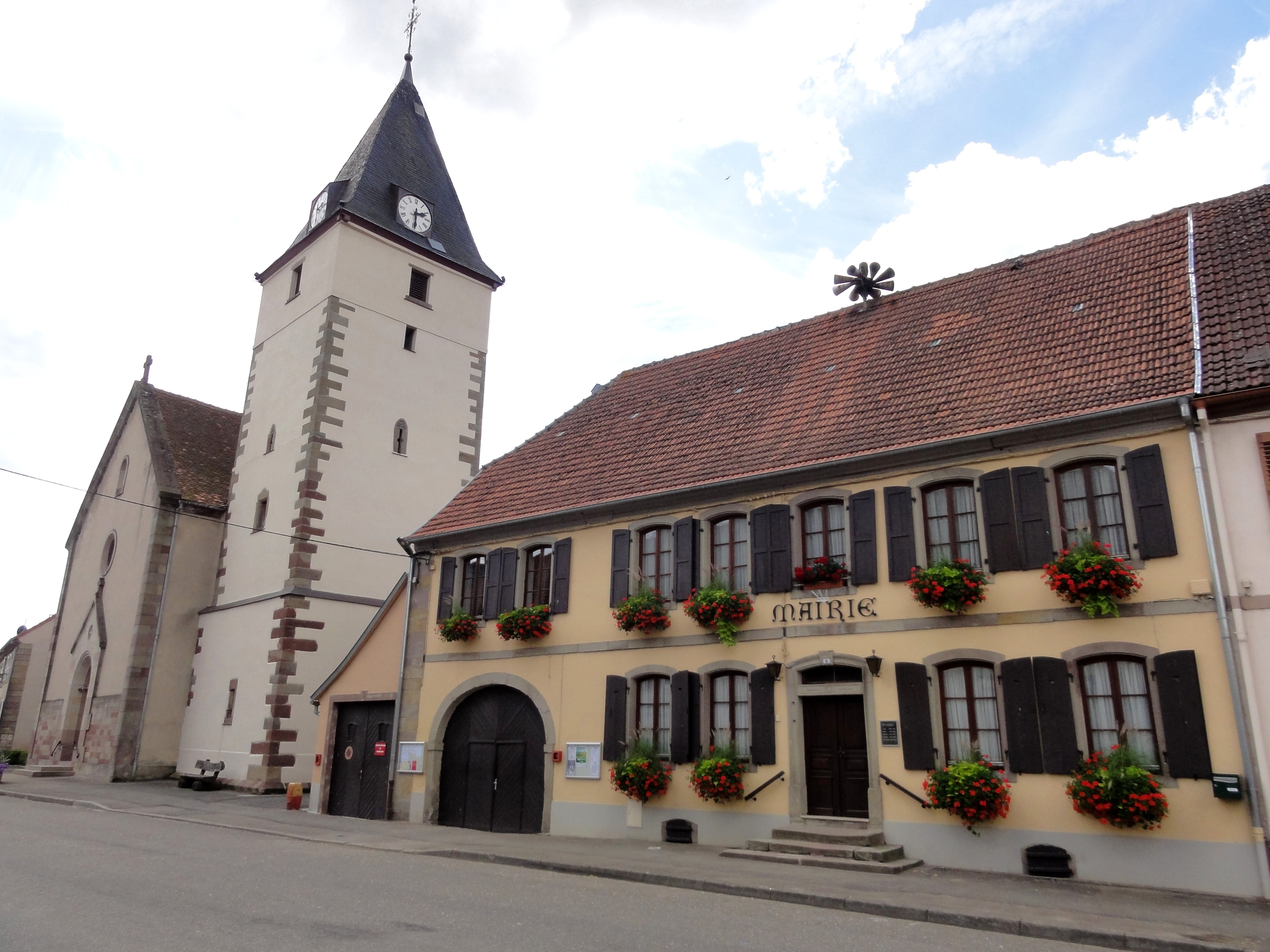 Alsace, Bas-Rhin, Harskirchen, Rue de Fénétrange Église Saint-Nicolas: . Mairie (1750): .